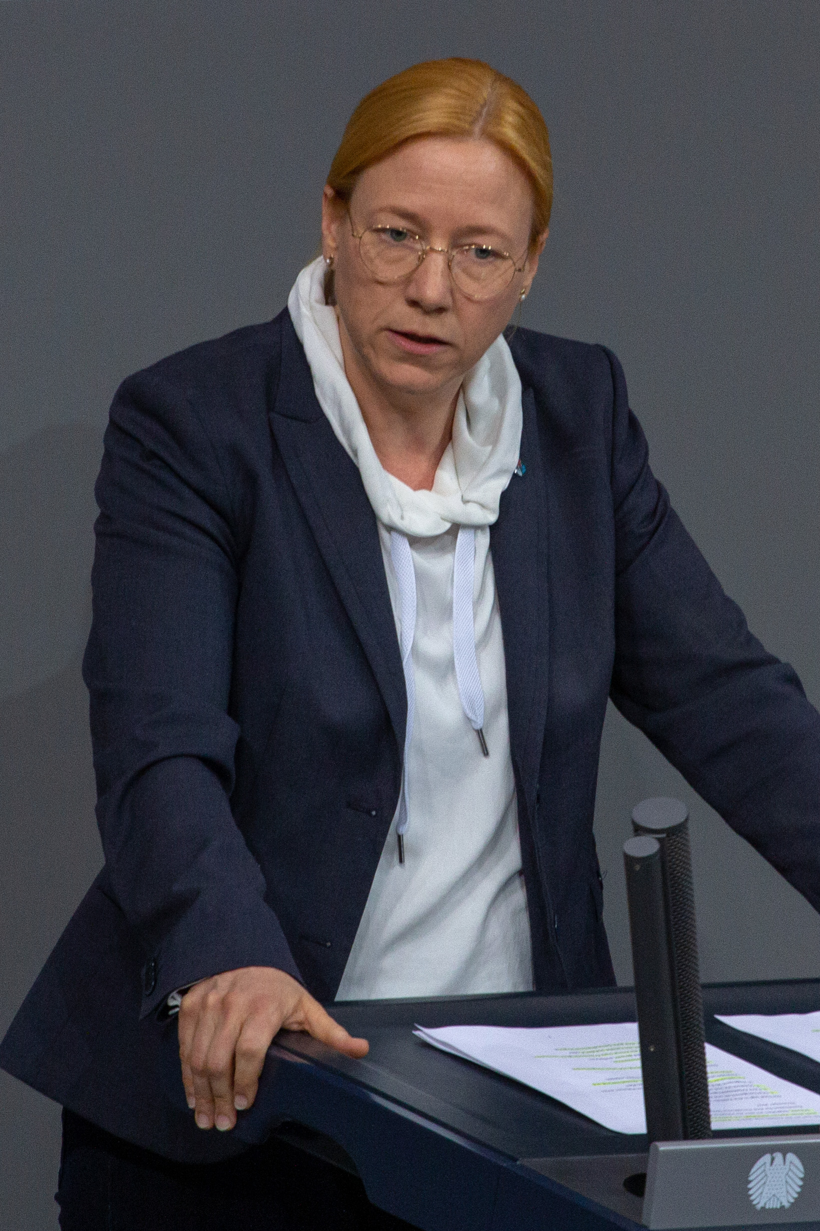 Dagmar Schmidt, Mitglied des Deutschen Bundestages, während einer Plenarsitzung am 11. April 2019 in Berlin.